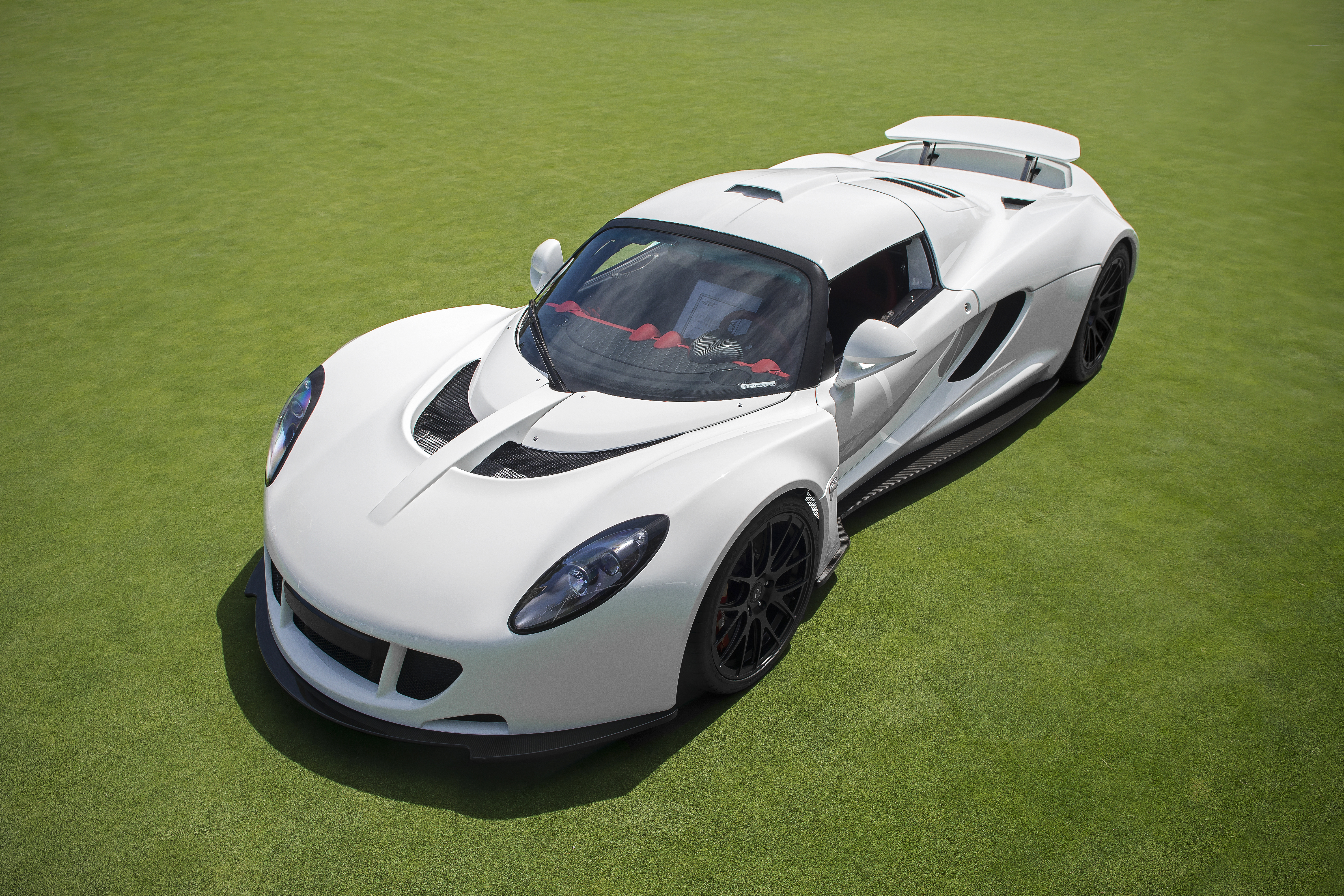 Hennessey Venom GT in Pebble Beach during Monterey Car Week 2014.